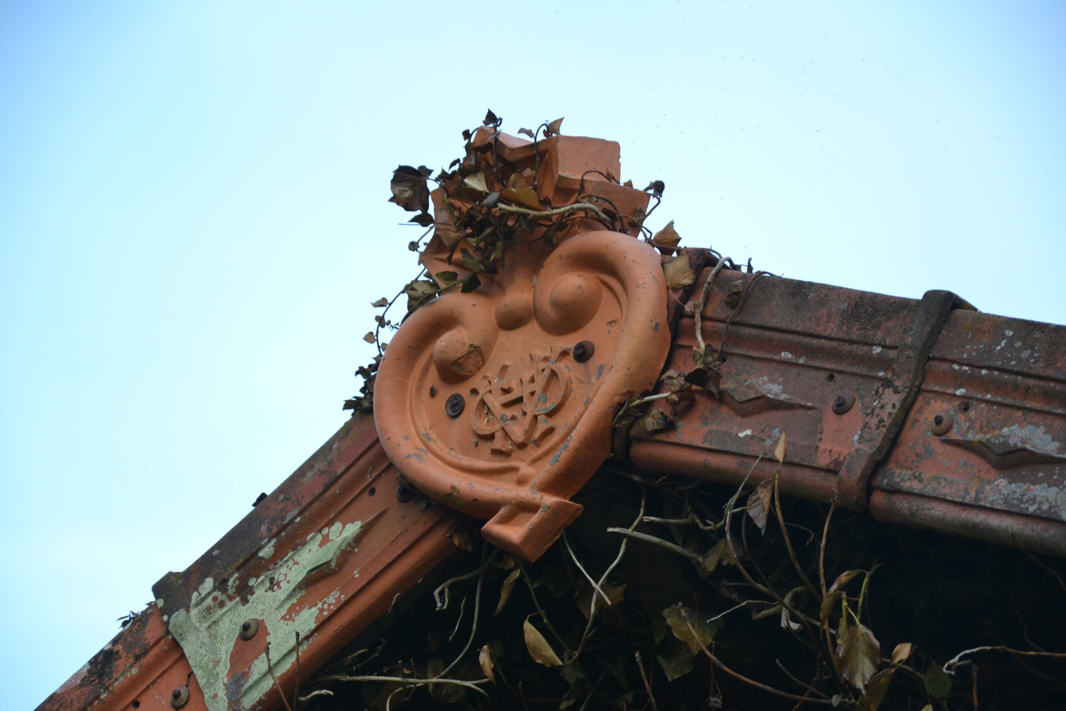 Monogramme des Chemins de fer départementaux de la Haute-Vienne sur le bâtiment de l'ancienne gare de Villevit (commune de Rancon, Haute-Vienne, France).